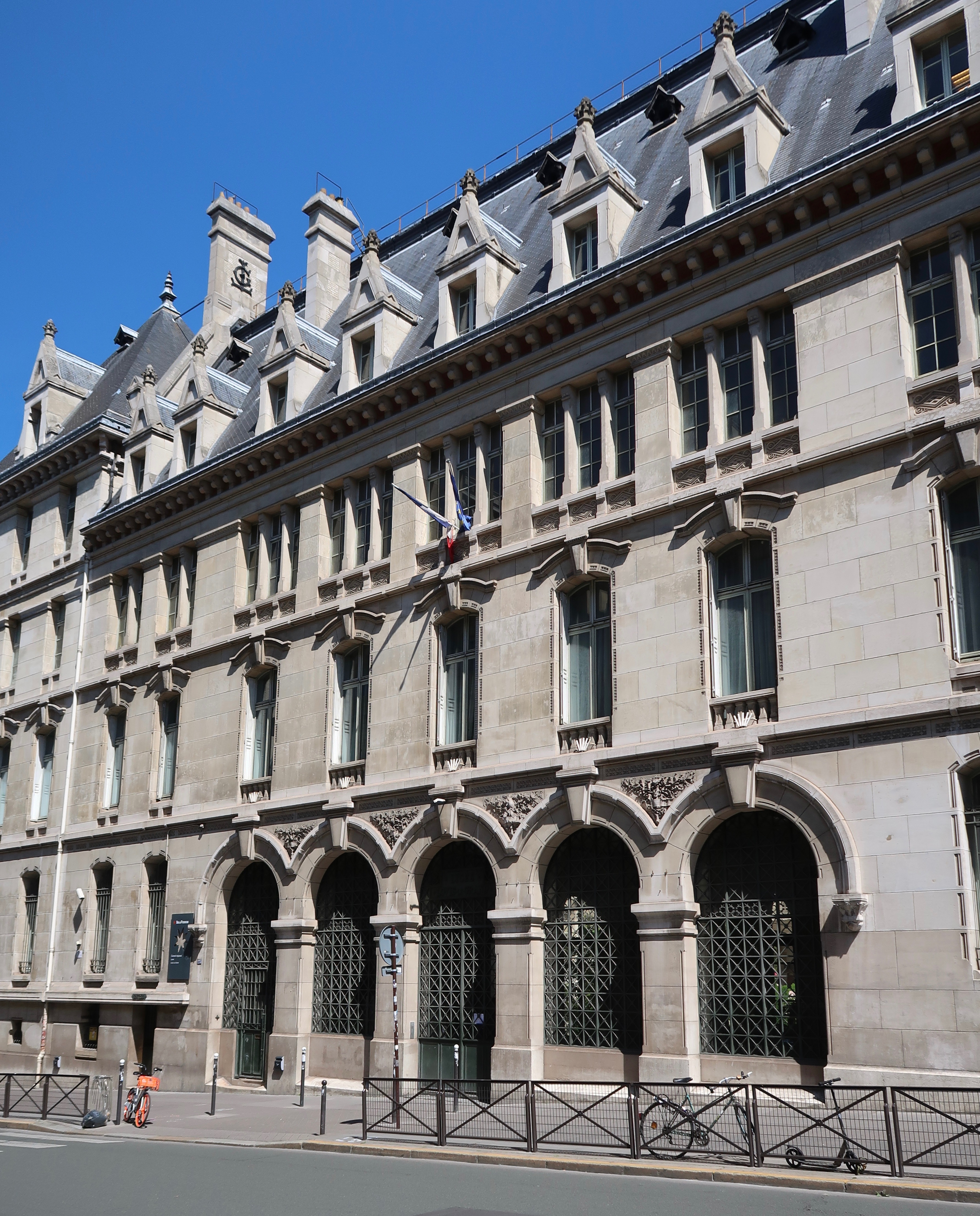 Lycée Louis-le-Grand, rue Saint-Jacques (Paris, 5e).